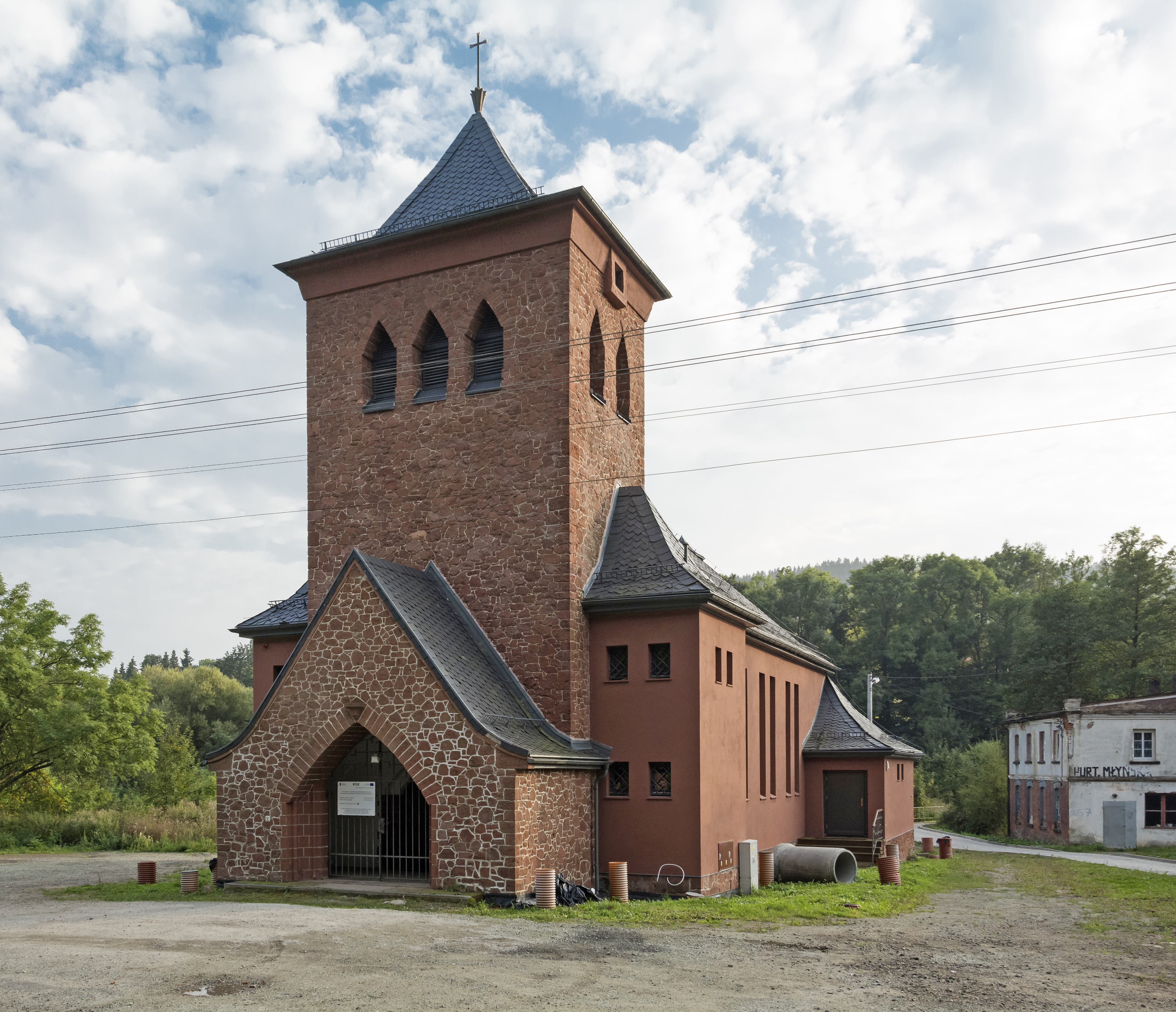 Ludwikowice Kłodzkie, kościół ewangelicki p.w. Błogosławieństwa Pańskiego, ob. Muzeum Ziemi Sowiogórskiej, 1929-1930